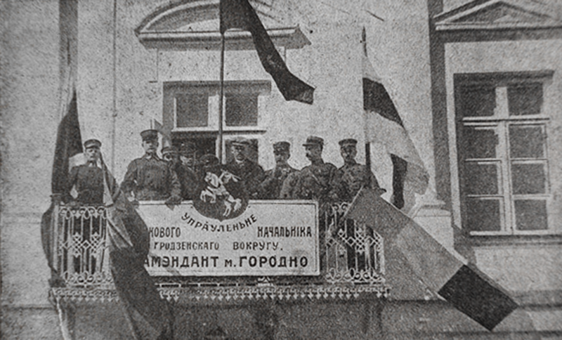 Беларуская (тарашкевіца): Беларуская камэндатура ў Горадні, пачатак 1919 году. Прыезд францускага палкоўніка Рэбуль.